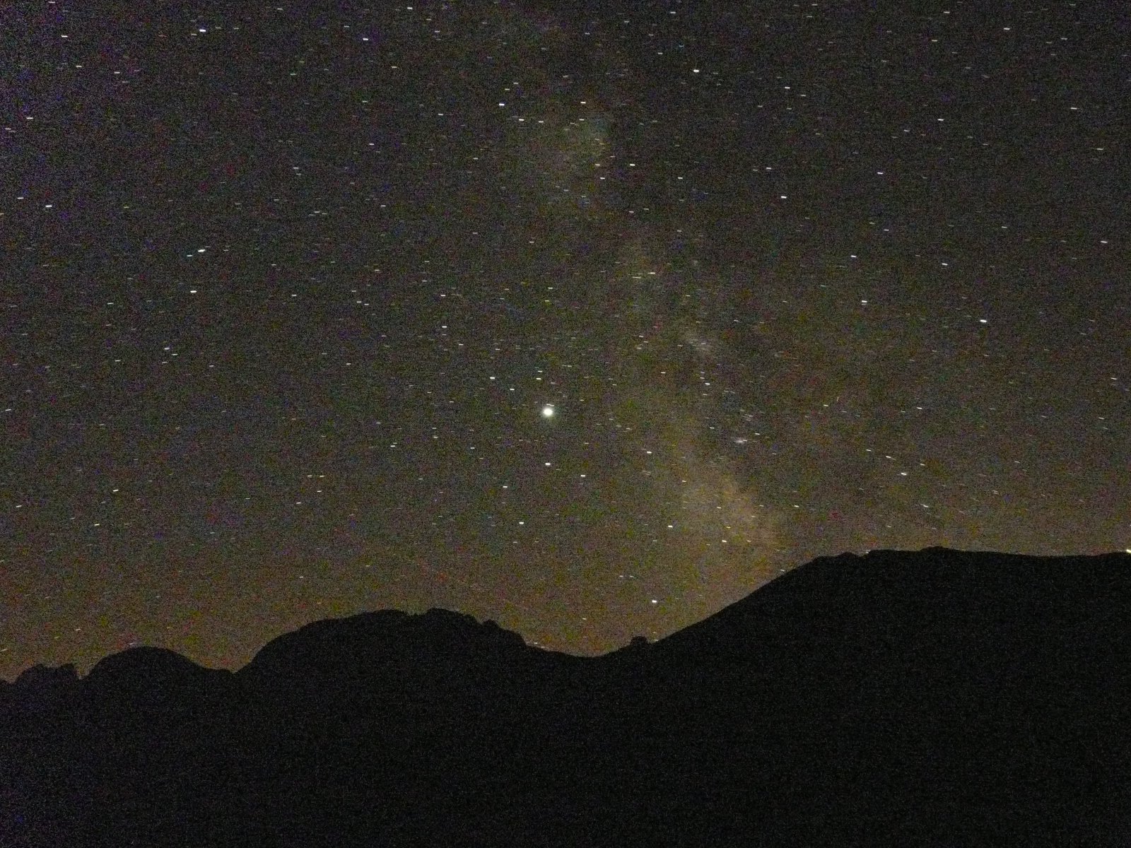 Vía Láctea de verano en la constelación de Sagitario (el planeta Júpiter es la estrella brillante a la izquierda de ella). Nótense también la estela luminosa de un avión y algo de contaminación lumínica cerca de las montañas.